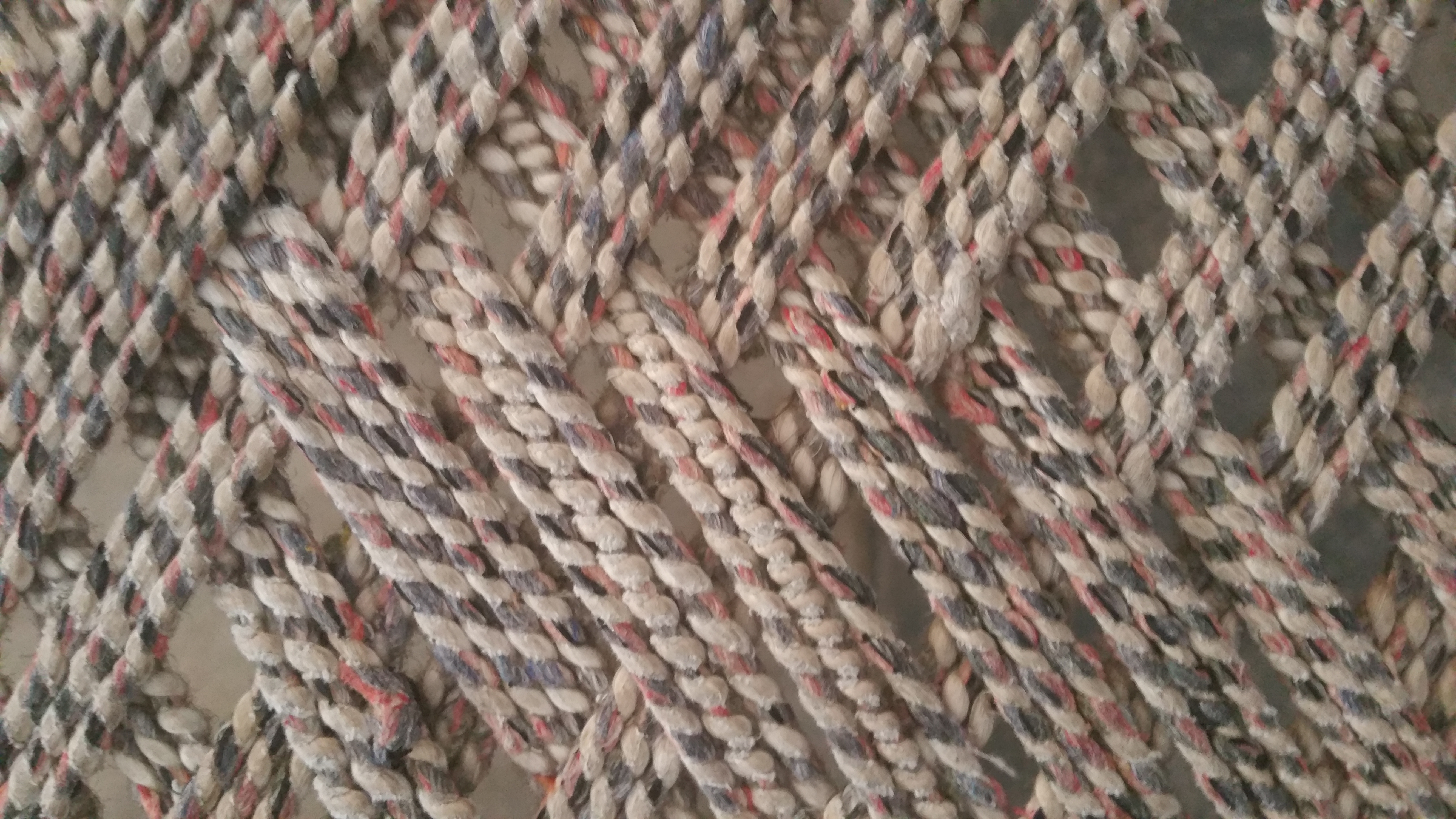 Pakistani boom cut